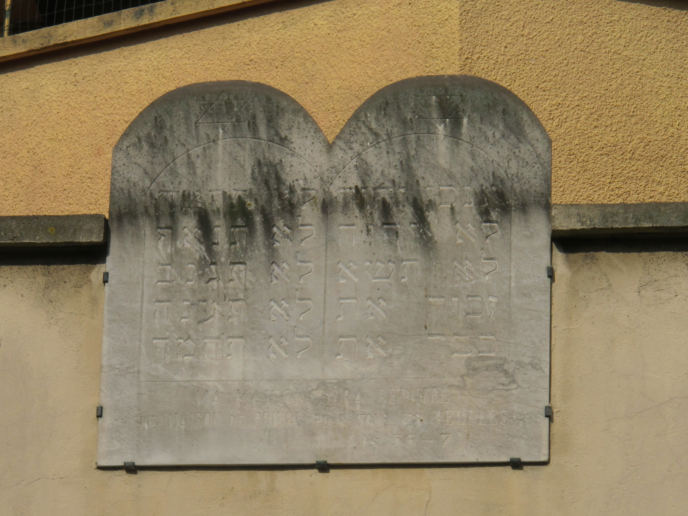 Synagogue Belleville, Paris